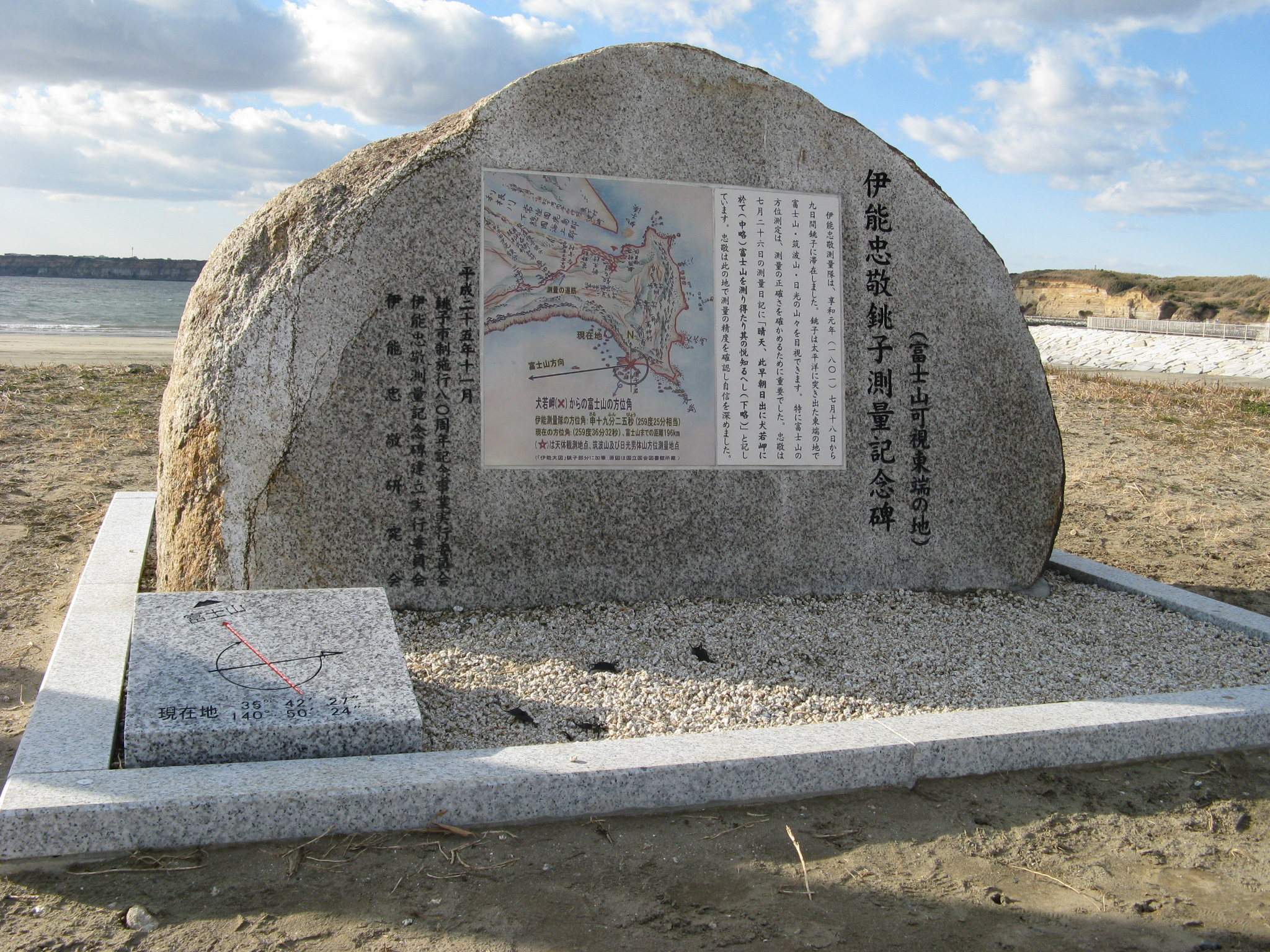 伊能忠敬銚子測量記念碑。